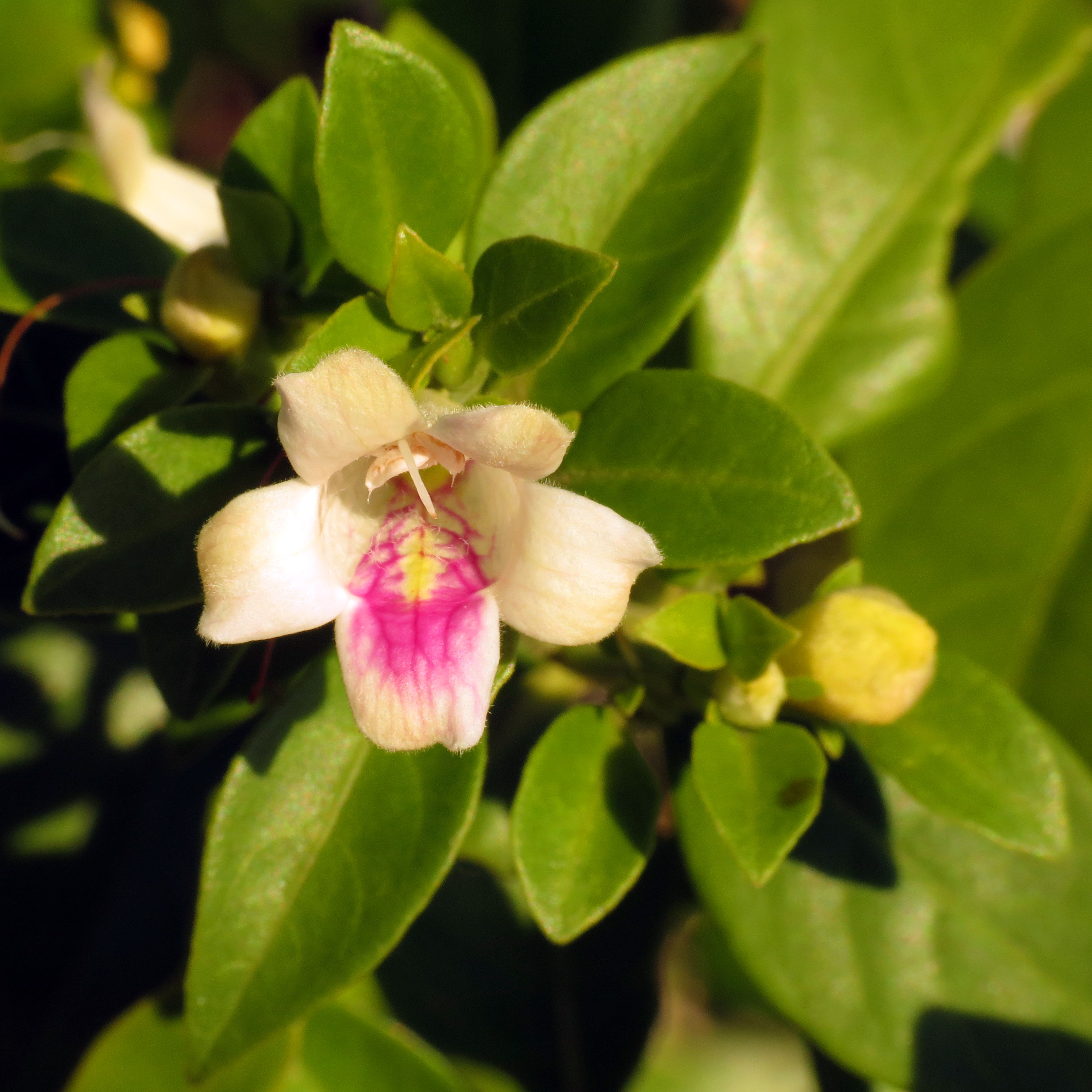 Bravaisia berlandieriana. Celestún Biosphere Reserve, Yucatán, México.